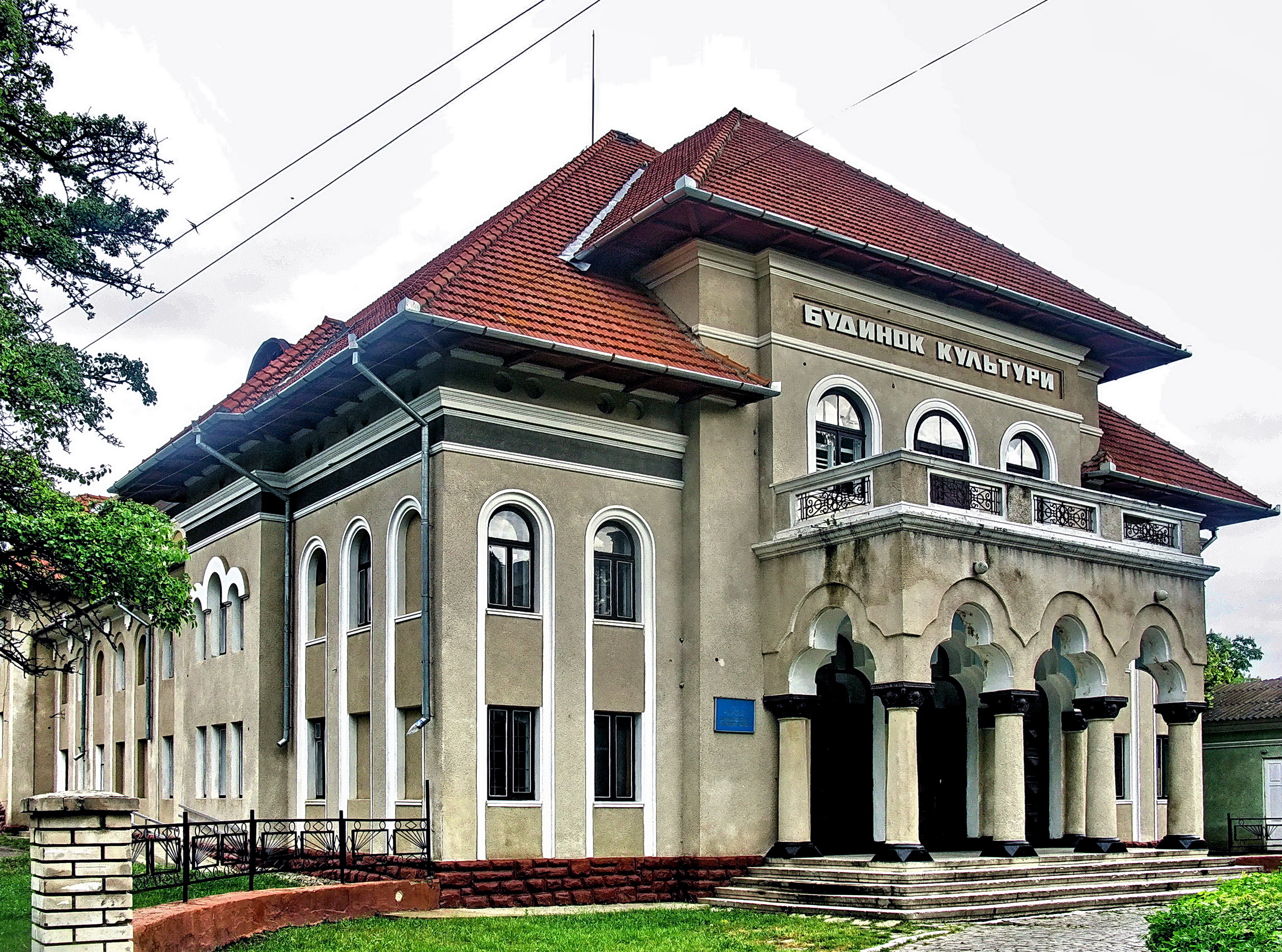 Театр (мур.), м. Хотин, вул. Незалежності, 42